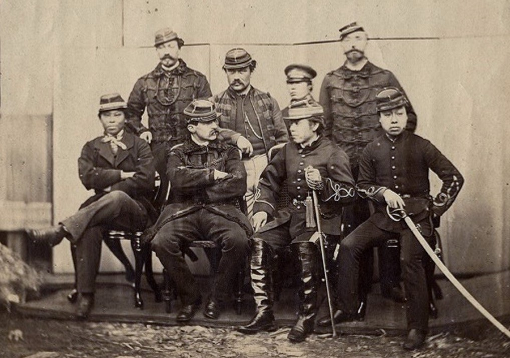 旧幕府軍。前列左から砲兵隊頭取細谷安太郎、ジュール・ブリュネ大尉、陸軍奉行並松平太郎、田島金太郎（応親）、後列左からアンドレ・カズヌーブ伍長、ジャン・マルラン軍曹、福島時之助、アルテュール・フォルタン軍曹